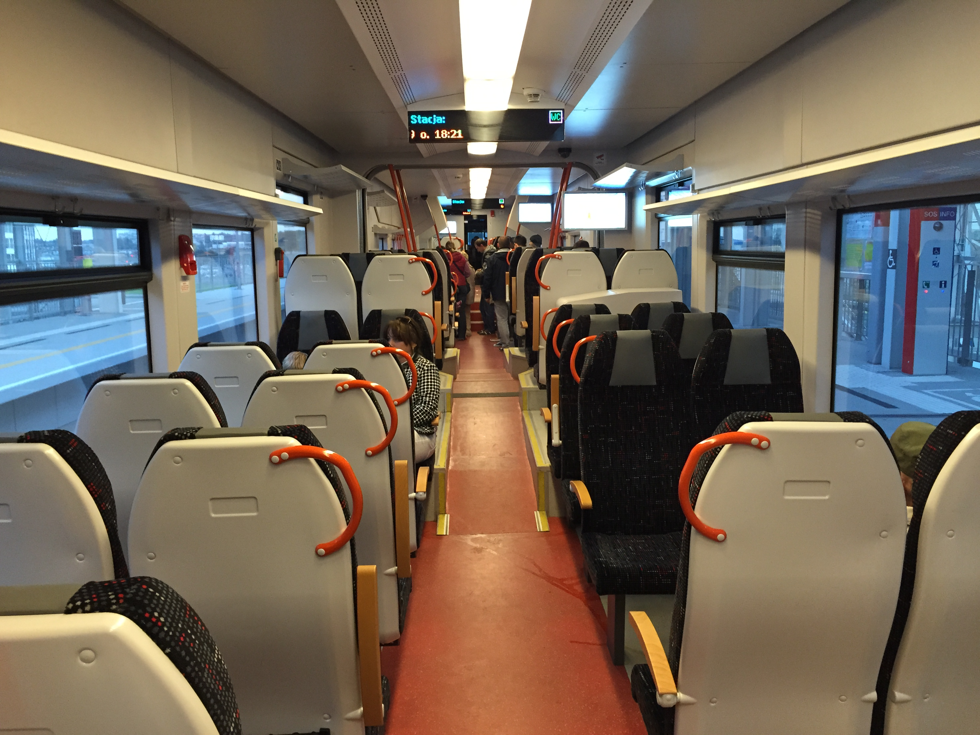 SA136 Gdańsk This photo was taken during Railway Wikiexpedition 2015 set up by Wikimedia Polska Association in cooperation with Fundacja Grupy PKP. You can see all photographs in category Wikiekspedycja kolejowa 2015.